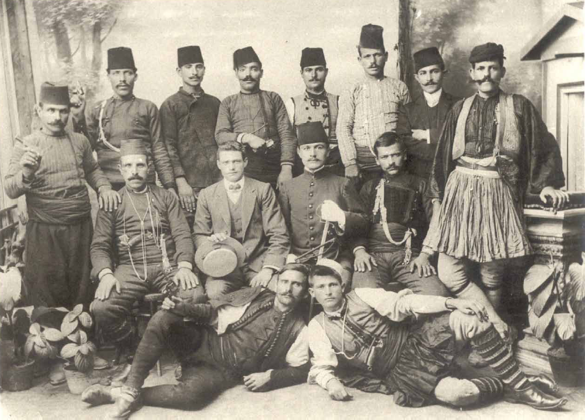 Четата на гъркоманските капитани Лазар Дояма, Янис Рамналис и Нури.